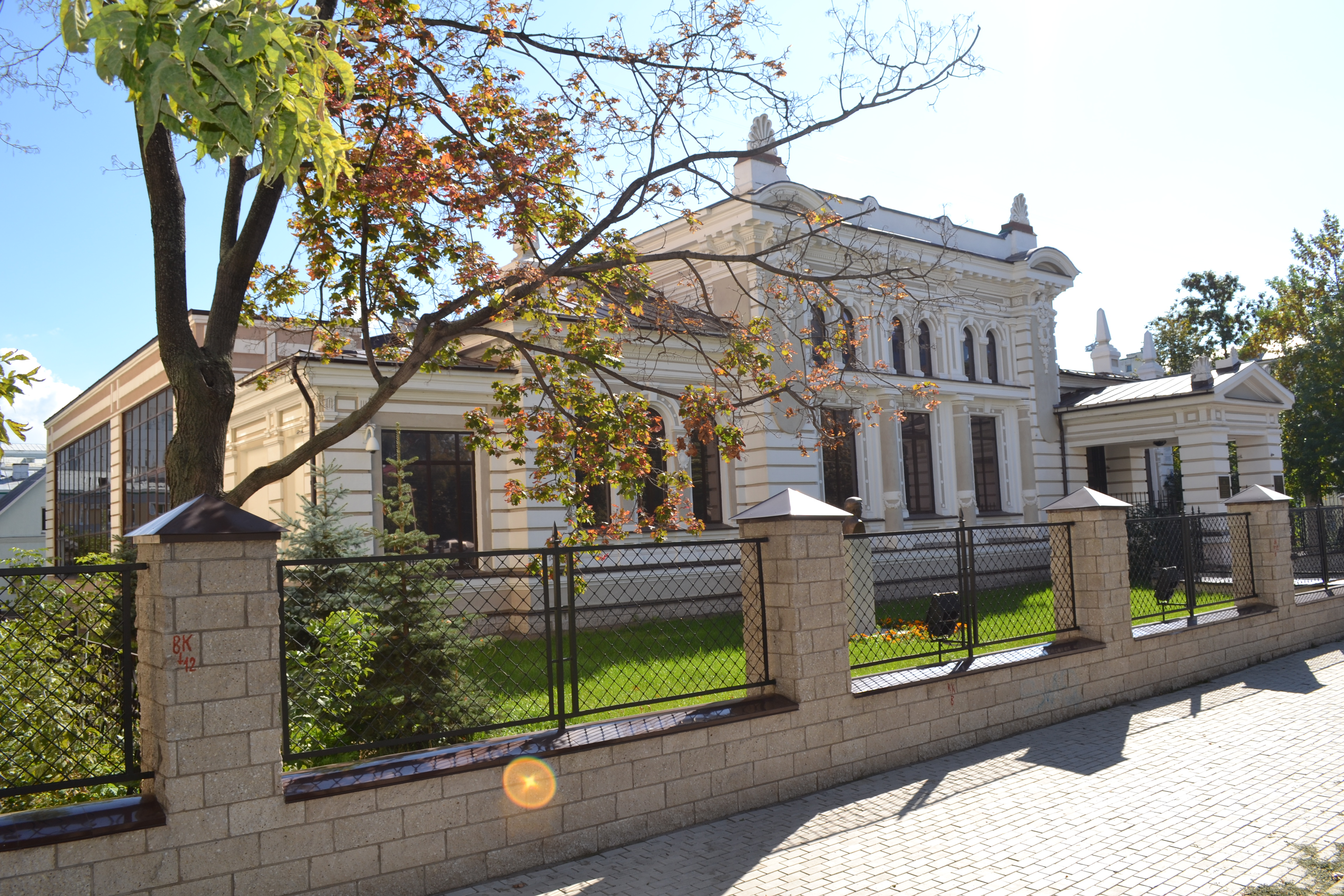 Здание, где находился штаб Чапаевской дивизии (Республика Башкортостан, Уфа, улица Карла Маркса, 6)